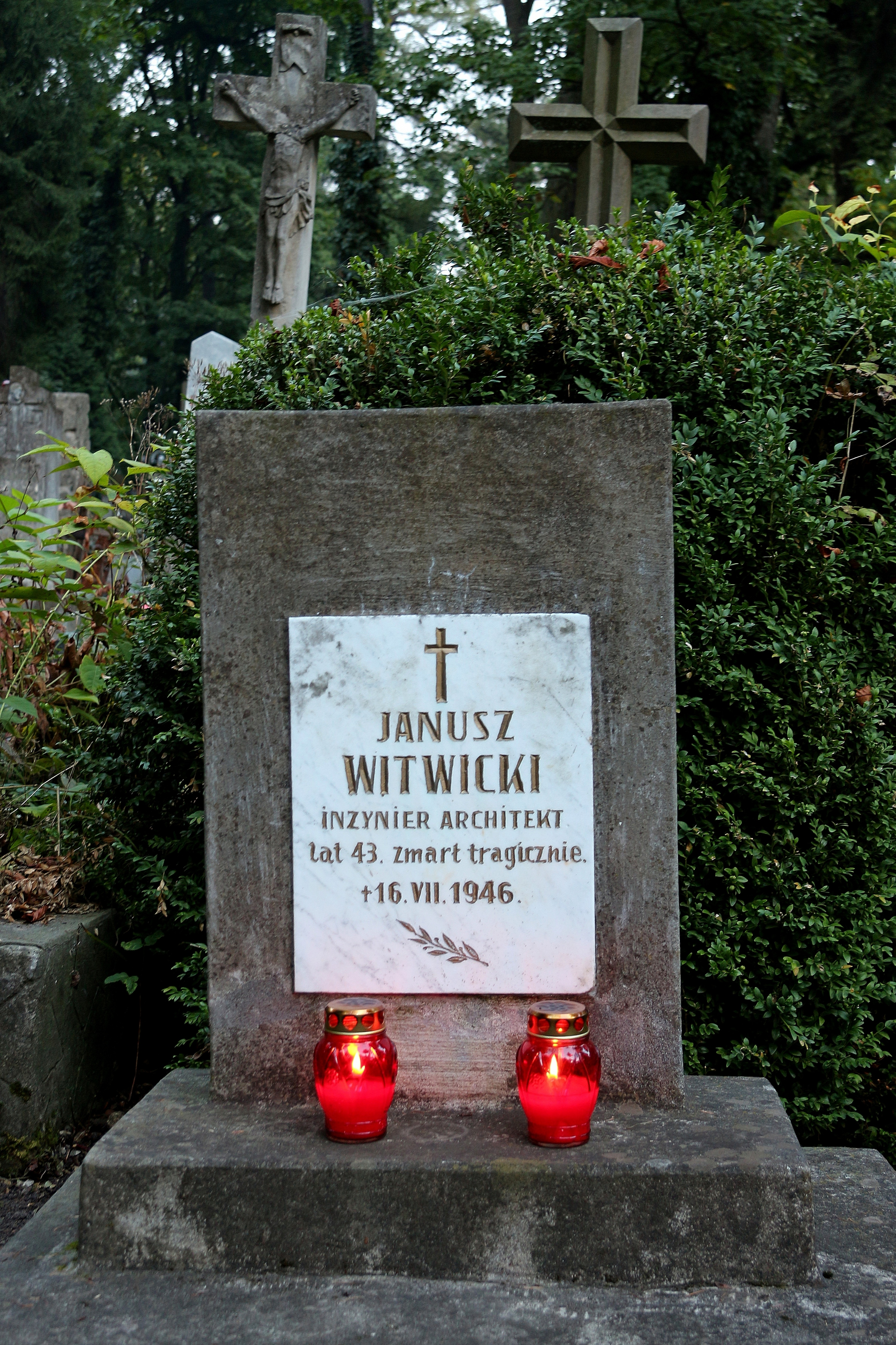 Могила Я. Вітвіцького.